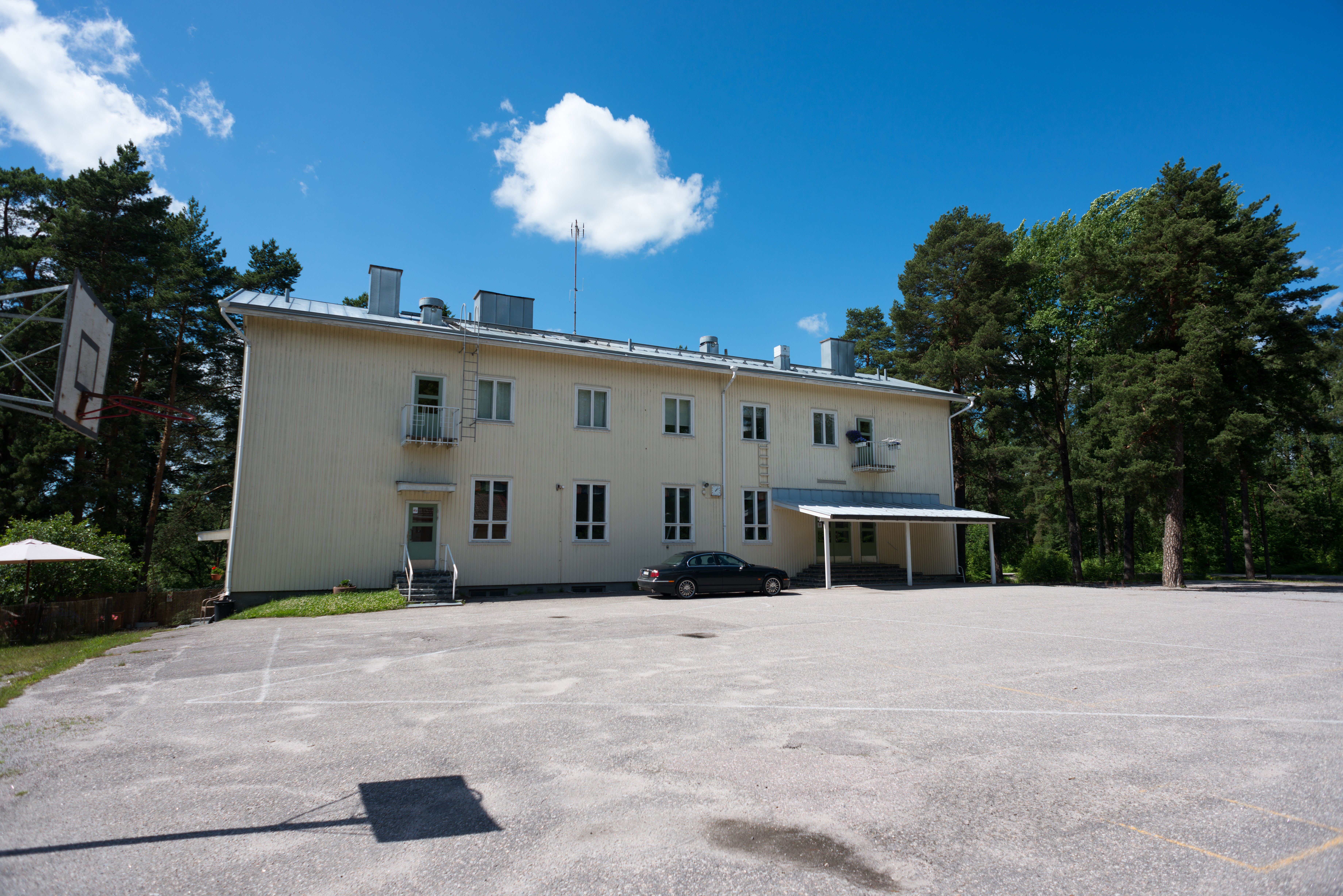 Märynummen koulu